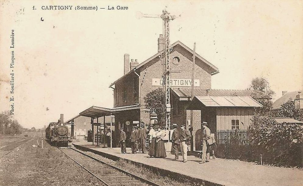 La première gare de Cartigny, remplacée vers 1908/10 lors du doublement de la voie.